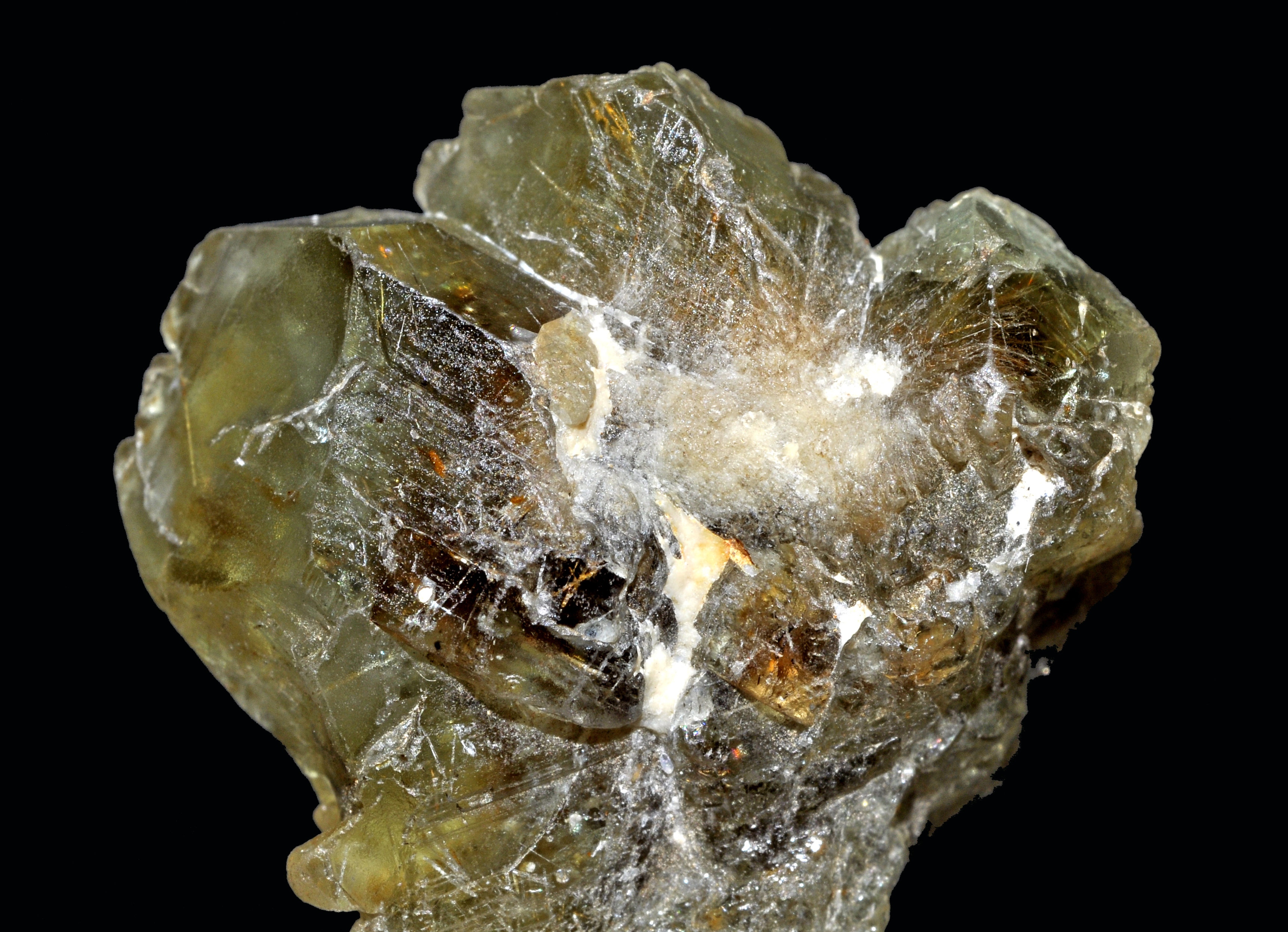 cristal (2,8 cm) de chrysoberyl var. alexandrite